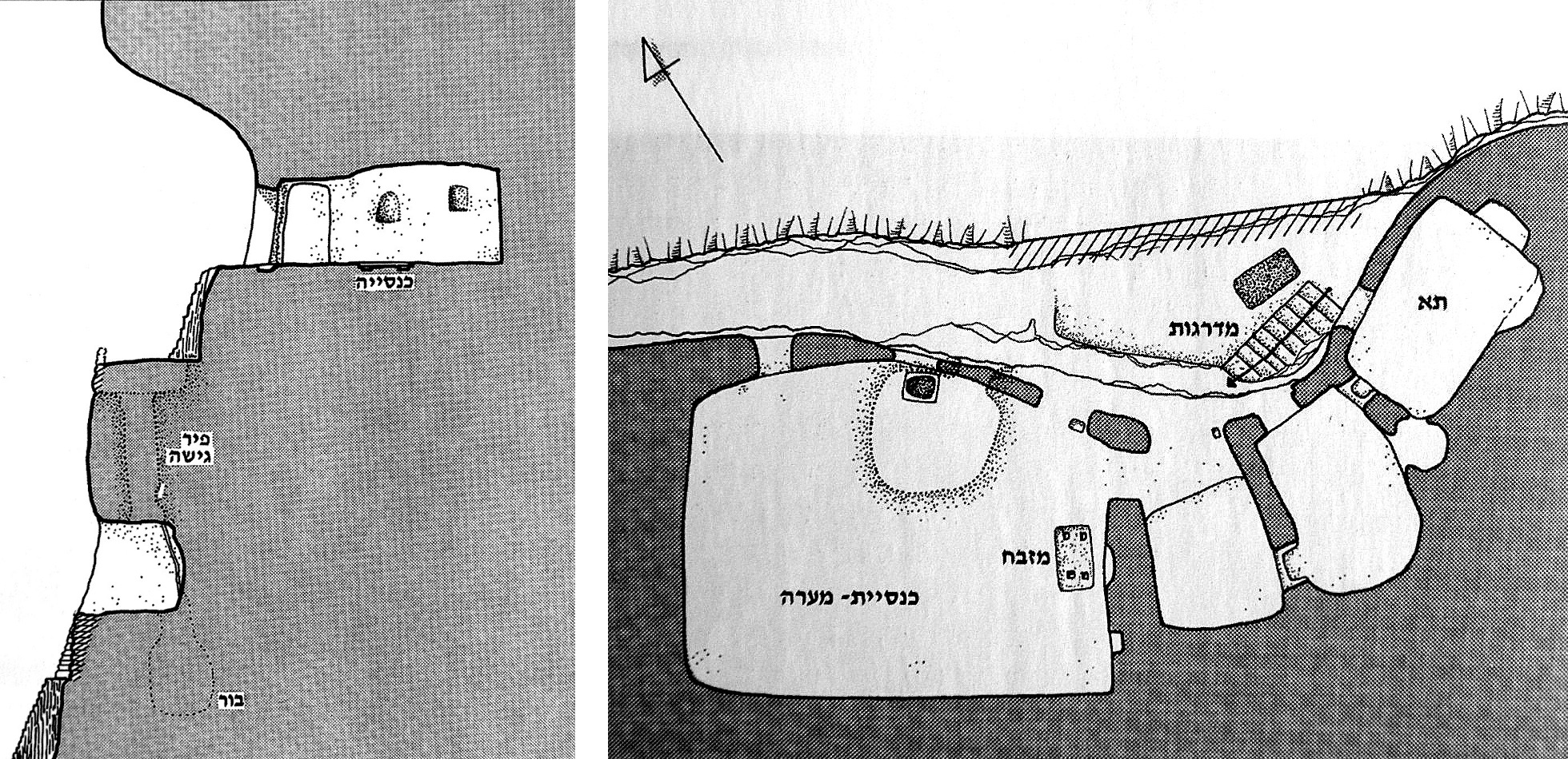 לאורת פרן - תכנית וחתך של כנסיית המערה